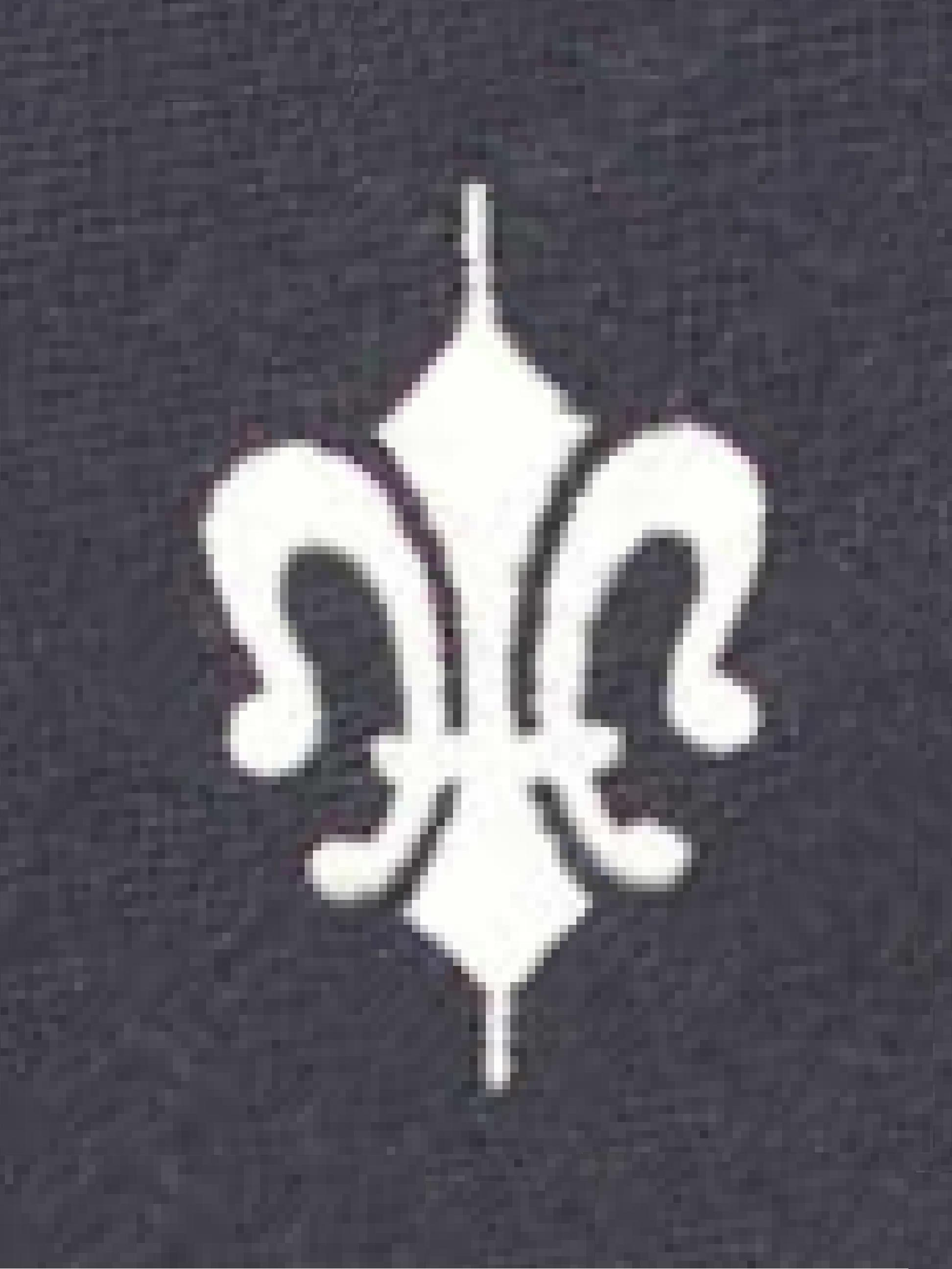 HPセーラー服のマークを元に作成